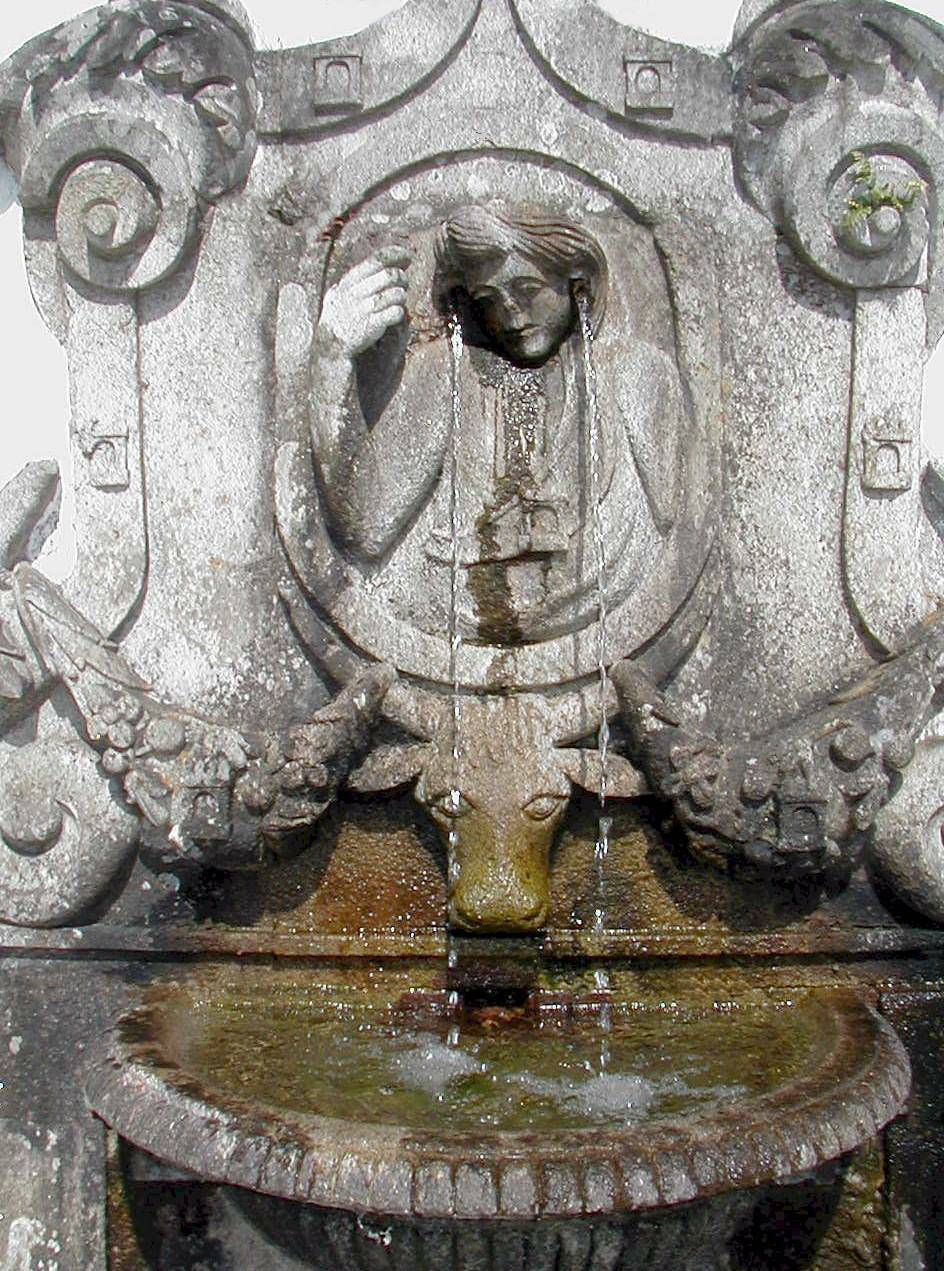 Foto da fonte do ouvido nos escadórios do Bom Jesus em Braga. Foto de Jose Goncalves